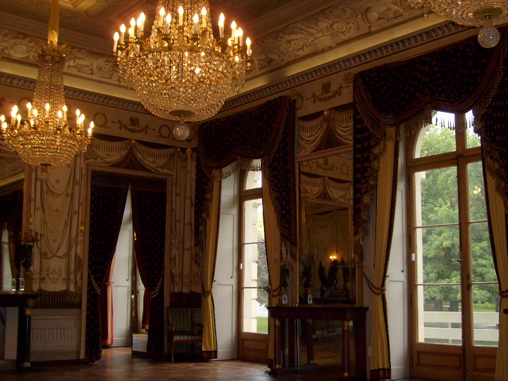 Second salon de réception du Palais Eynard à Genève (Suisse)